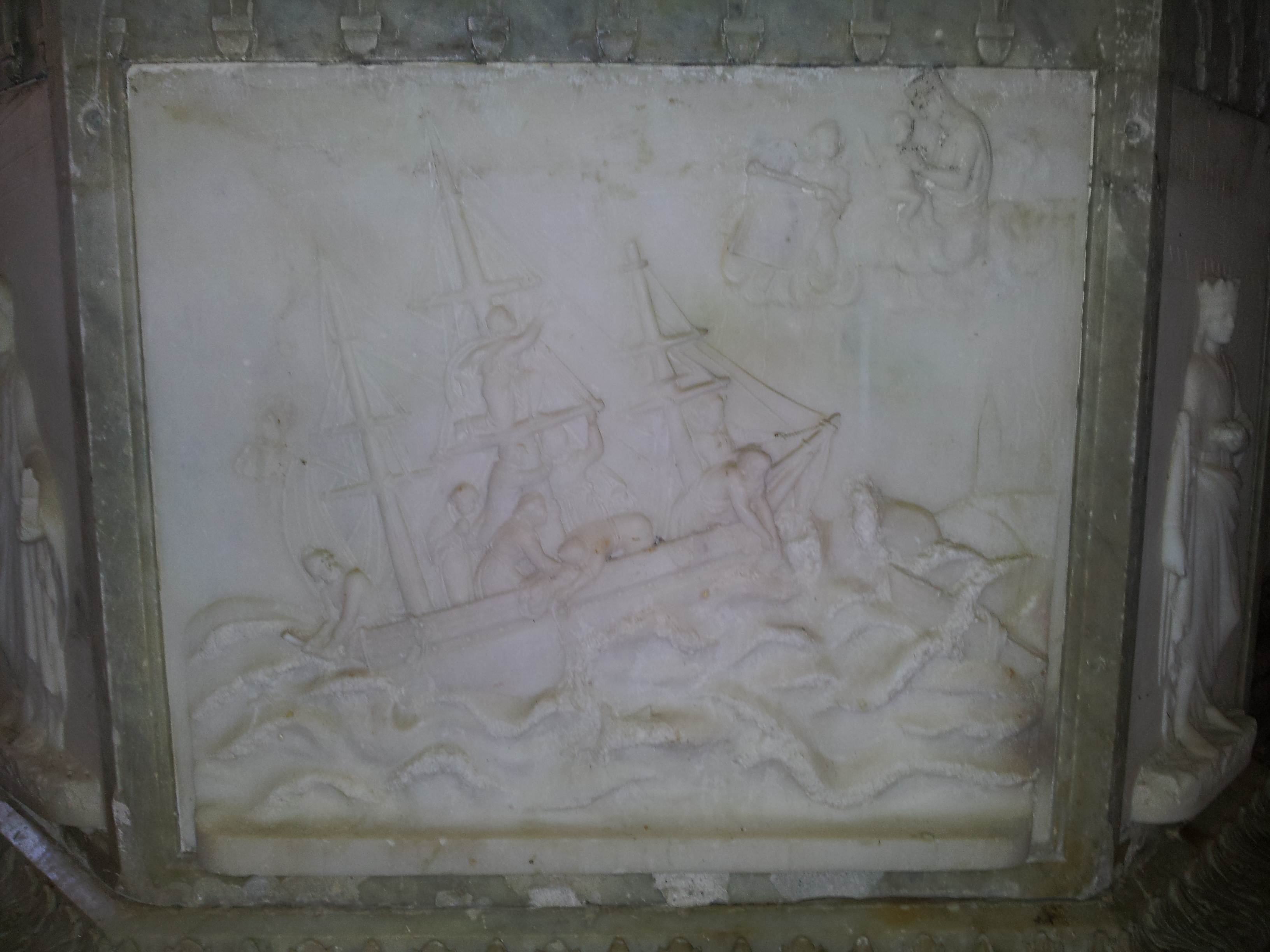 Bas-relief de l'autel de Notre-Dame de la Délivrande : vœu de Monseigneur Le Herpeur à la Sainte Vierge lors de la traversée vers la Martinique